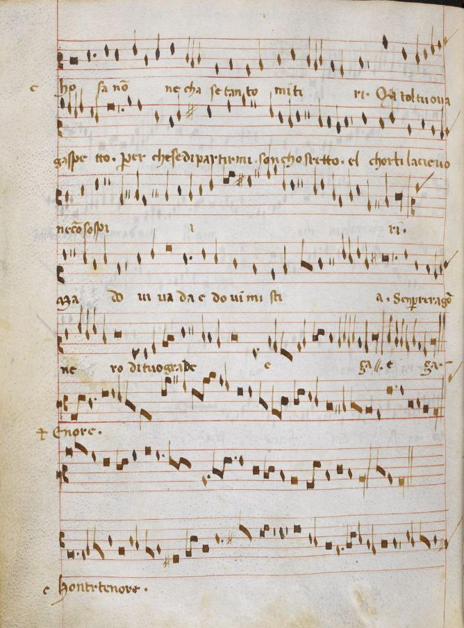 BL 29987